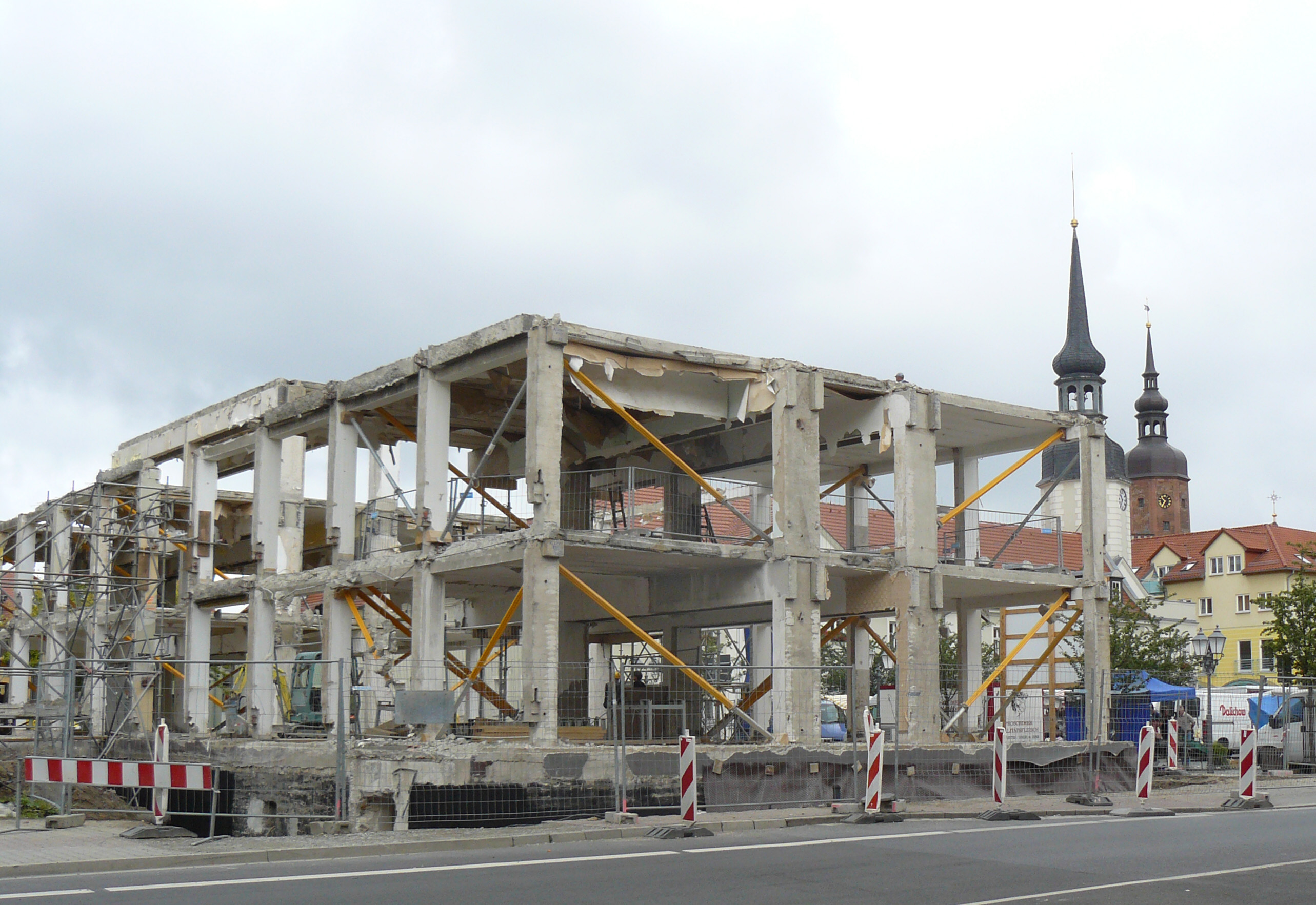 Umbau des Arbeiterwohnheimes Spremberg zum Bürgerhaus.